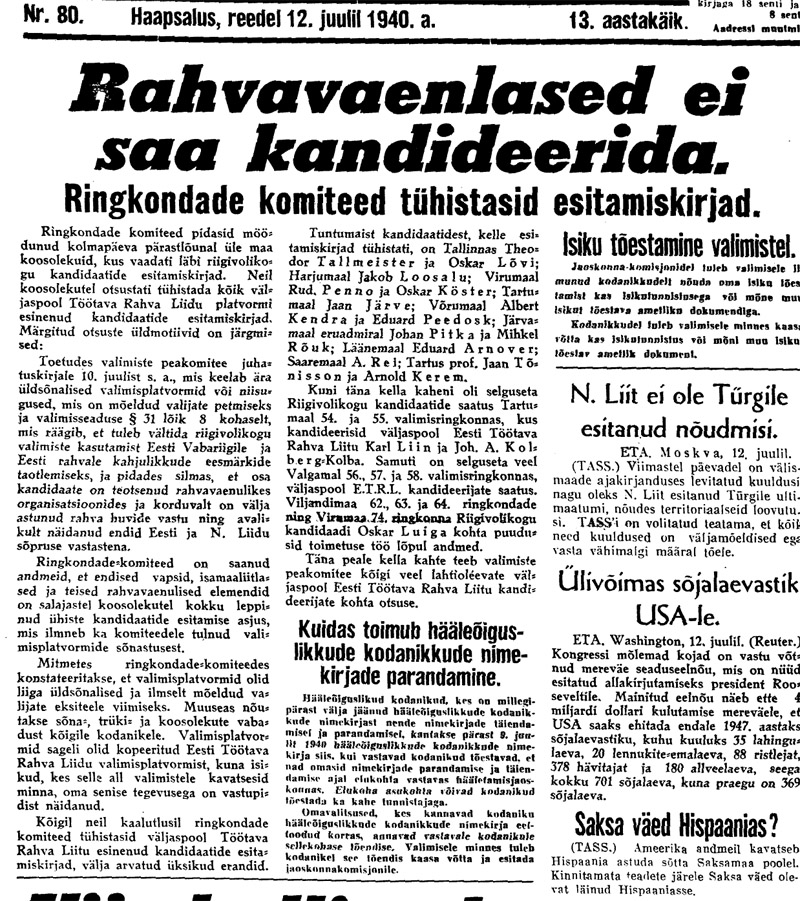 Ajaleht Lääne Elu, lk 1. Valimisnimekirjade tühistamine. Kuidas toimub hääleõiguslike kodanike nimekirjade parandamine. Isiku tõestamine valimistel.